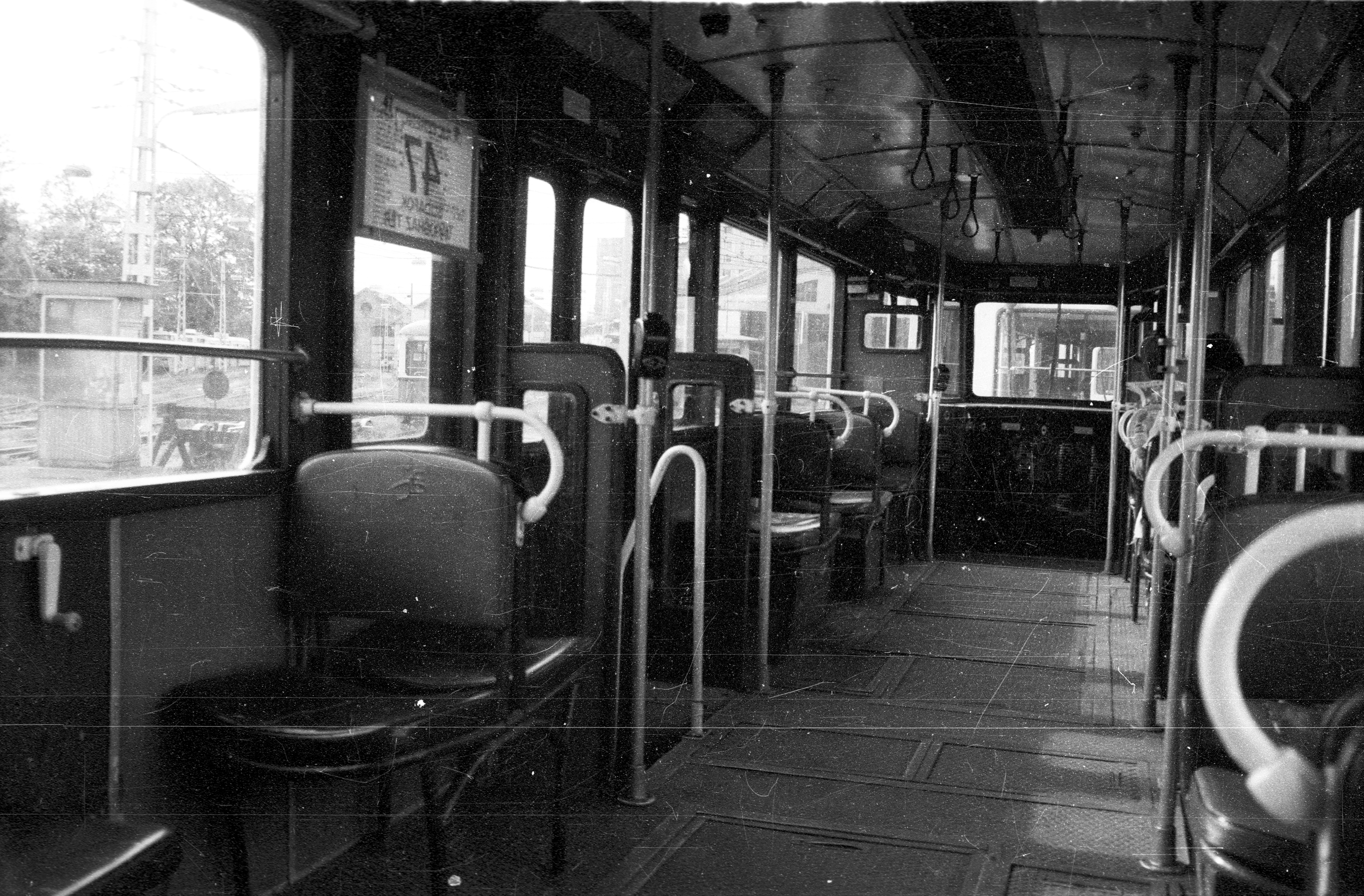 Fehérvári út 247., Budafok kocsiszín. Location: Hungary, Budapest XI. Tags: Budapest Title: Fehérvári út 247., Budafok kocsiszín.